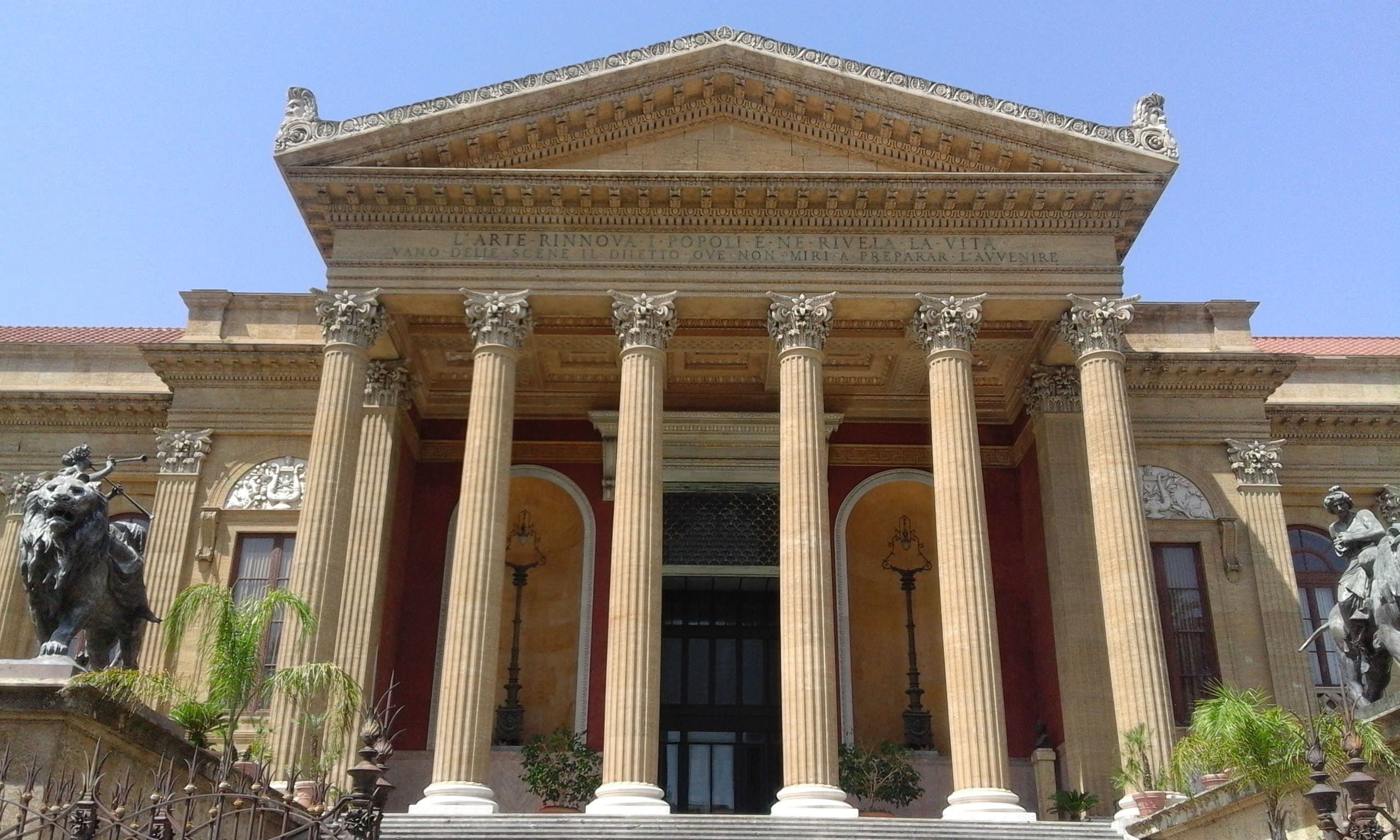 Il Teatro Massimo Vittorio Emanuele illuminato dai raggi del protagonista della calda e lunga estate 2016 This is a photo of a monument which is part of cultural heritage of Italy.